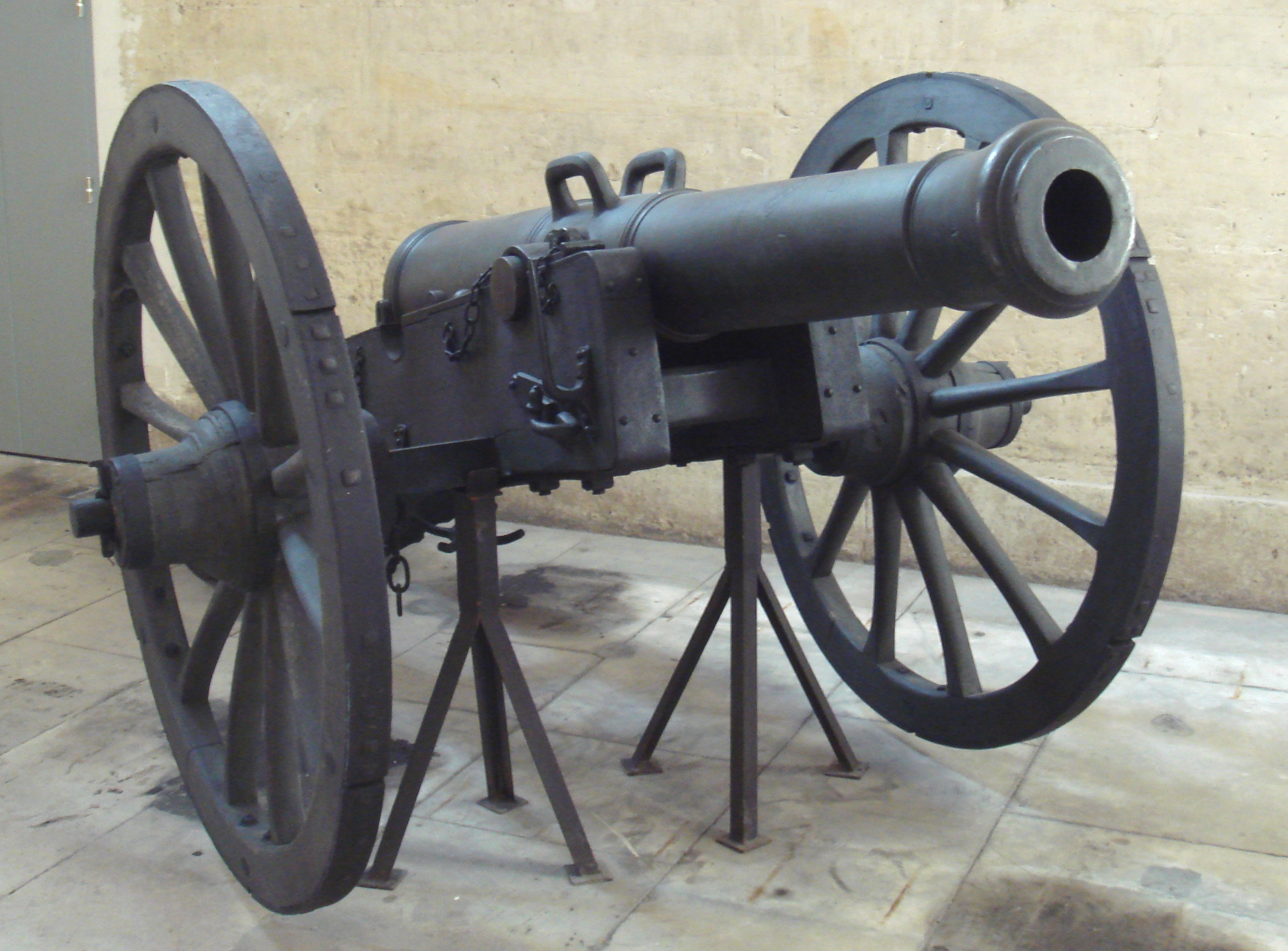 Gribeauval_cannon_de_12_An_2_de_la_Republique (1793-1794)